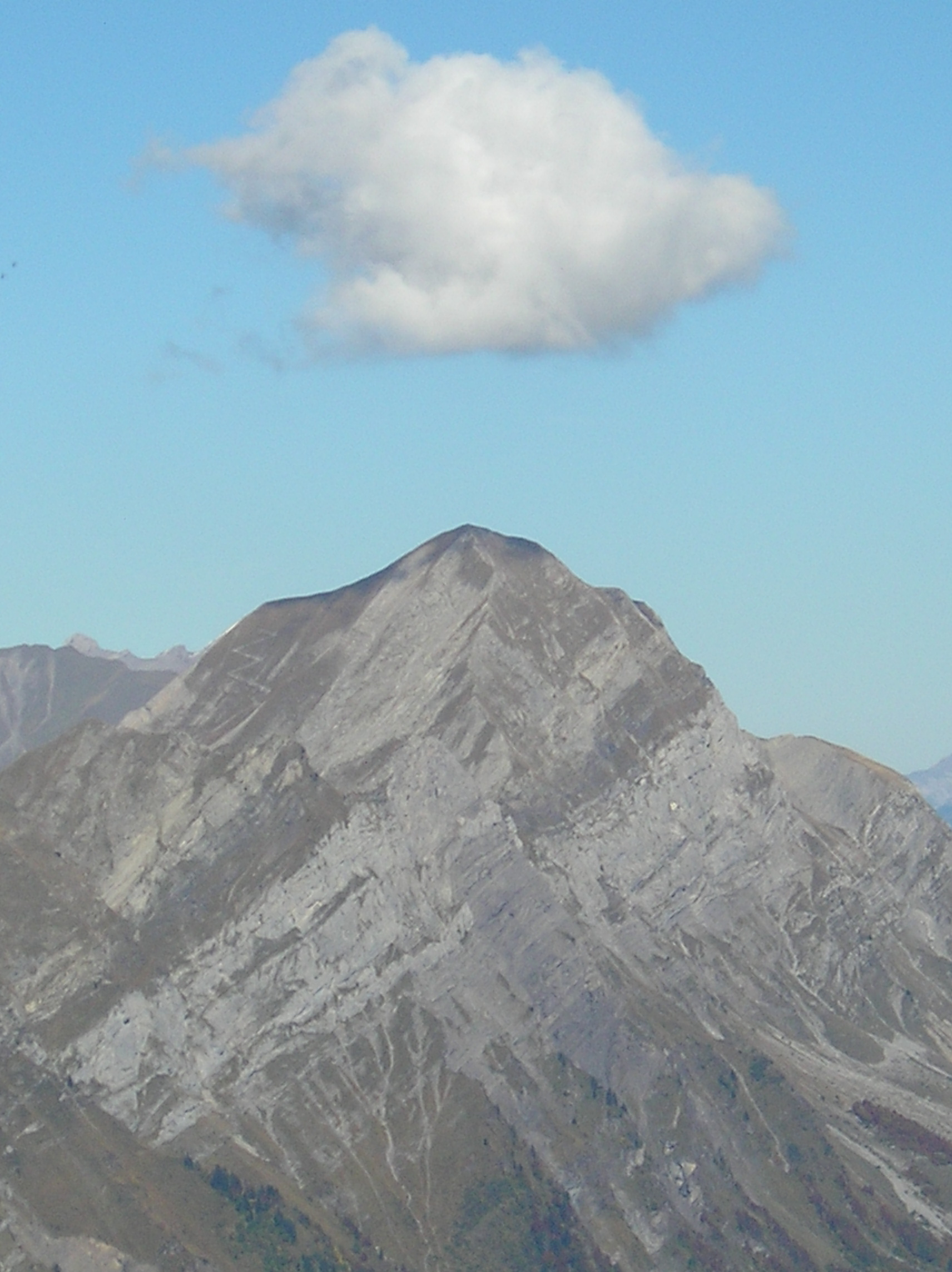 Drôle de nuage stoppé au dessus du Mont Charvin, vu du sommet de la Dent de Cons.